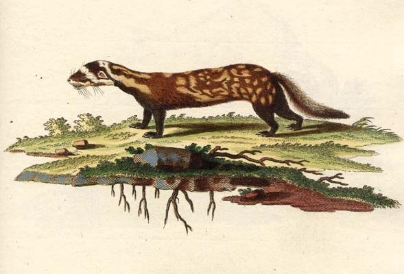 Vormela peregusna, plate from Schreber, Johann Christian Daniel von, Histoire naturelle des quadrupèdes représentés d´après nature. Tome III. Le phoque, le chien, le chat, le putois, la loutre, la marte, l'ours, le didelphe, la taupe, la souris, le hérisson A Erlang, chez Wolfgang Walther, 1780